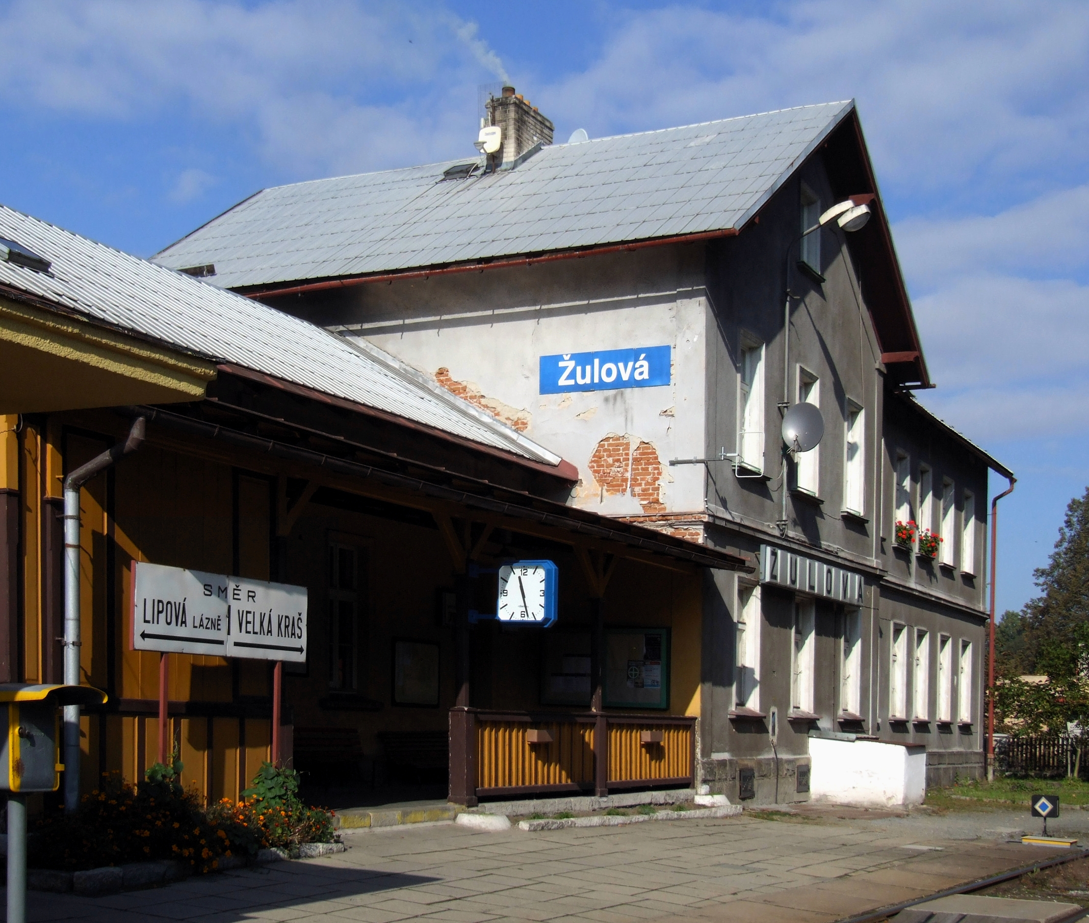 Žulová (Friedberg) - železniční stanice